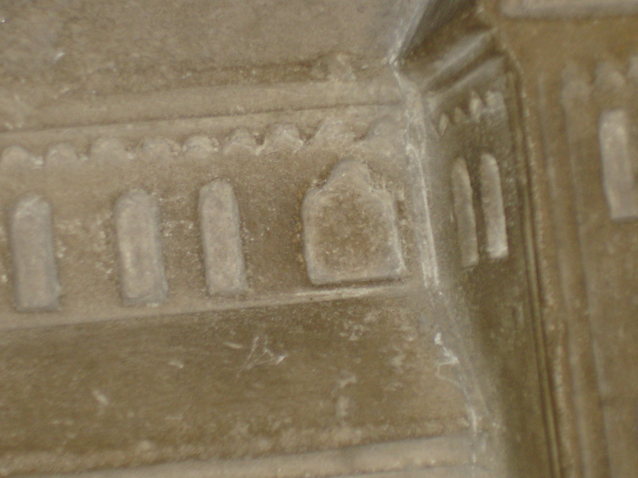 Braunschweiger Dom, Grabmal Heinrichs des Löwen (Detail)